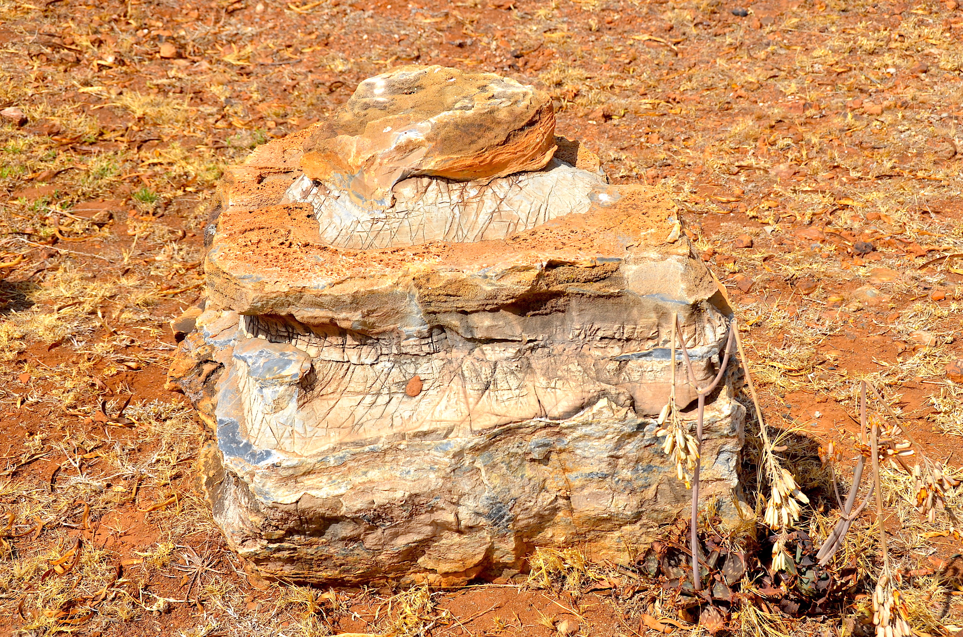 Chert und Stromatolith reiches Dolomit Gestein (Pelindaba Stein)